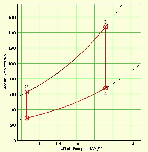 Joule-Prozess im T-s-Diaghramm